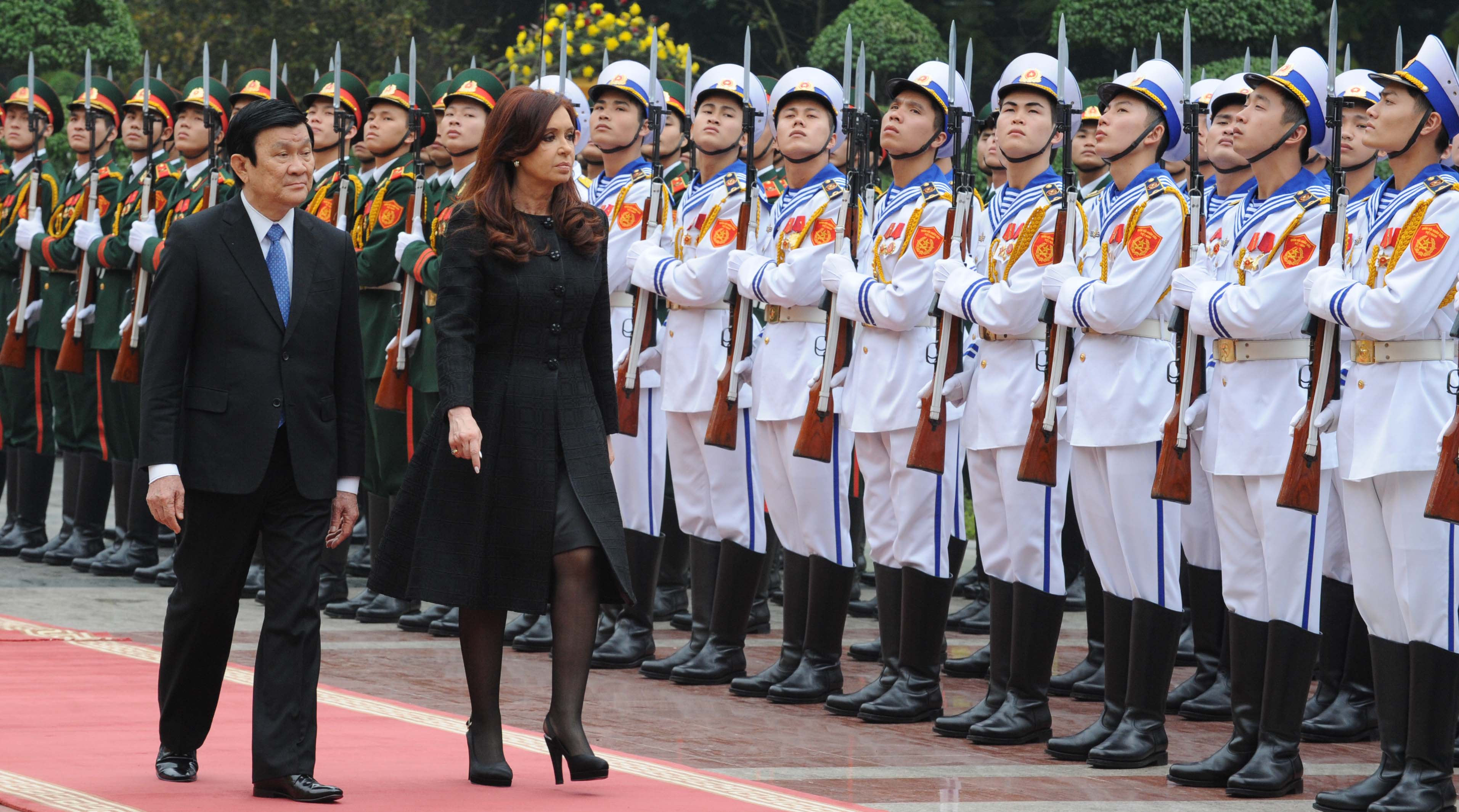 La presidenta Cristina Fernández se reunió hoy con su par de Vietnam, Truon Tan Sang en el Palacio Presidencial de la capital Hanoi, y tras el encuentro resaltó la relación entre ambos países. Ambos mandatarios acordaron avanzar en futuros acuerdos en biotecnología, agricultura de precisión, energía nuclear con fines pacíficos y recursos renovables.